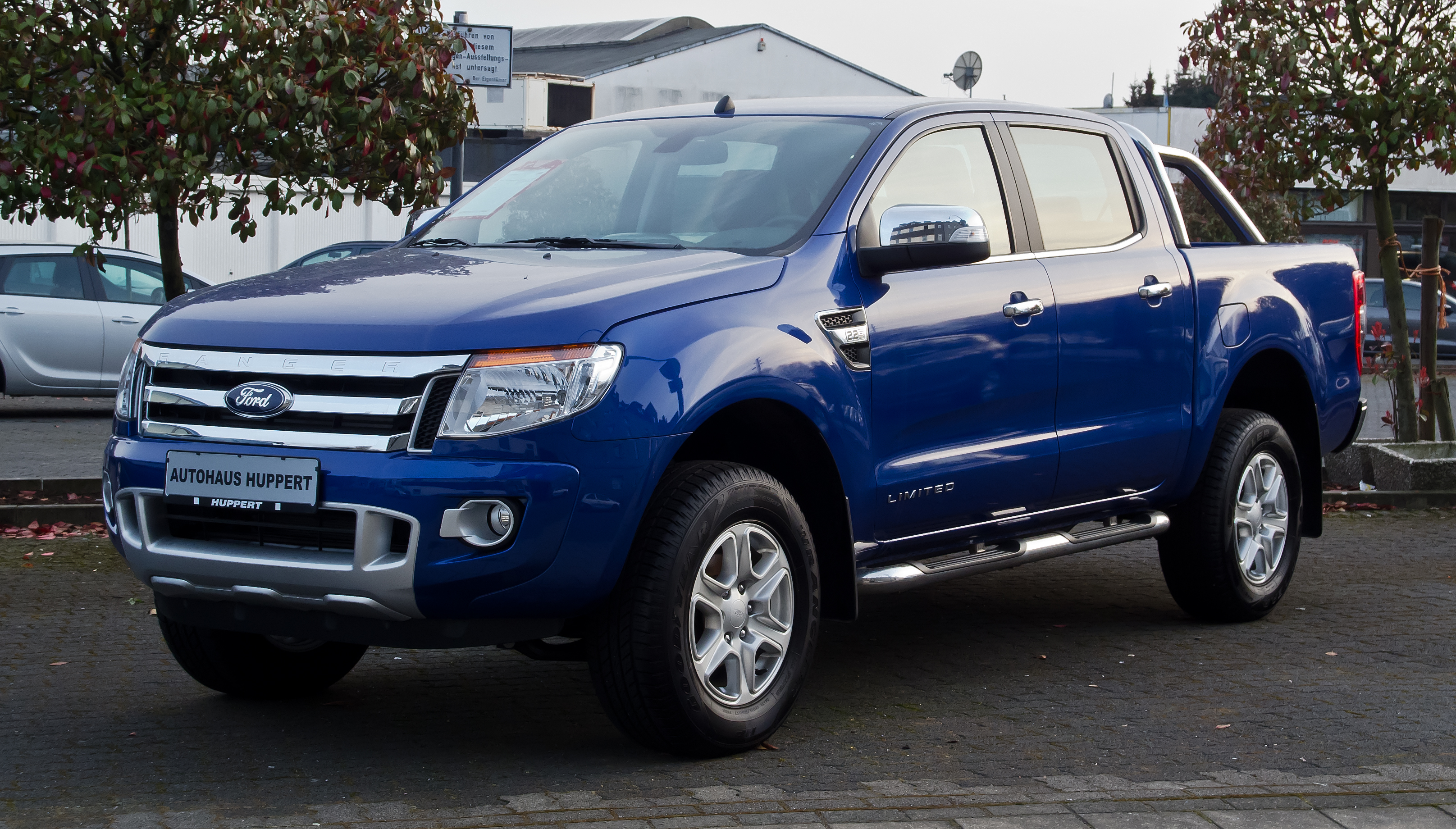 Ford Ranger 2.2 TDCi Limited Doppelkabine (III)